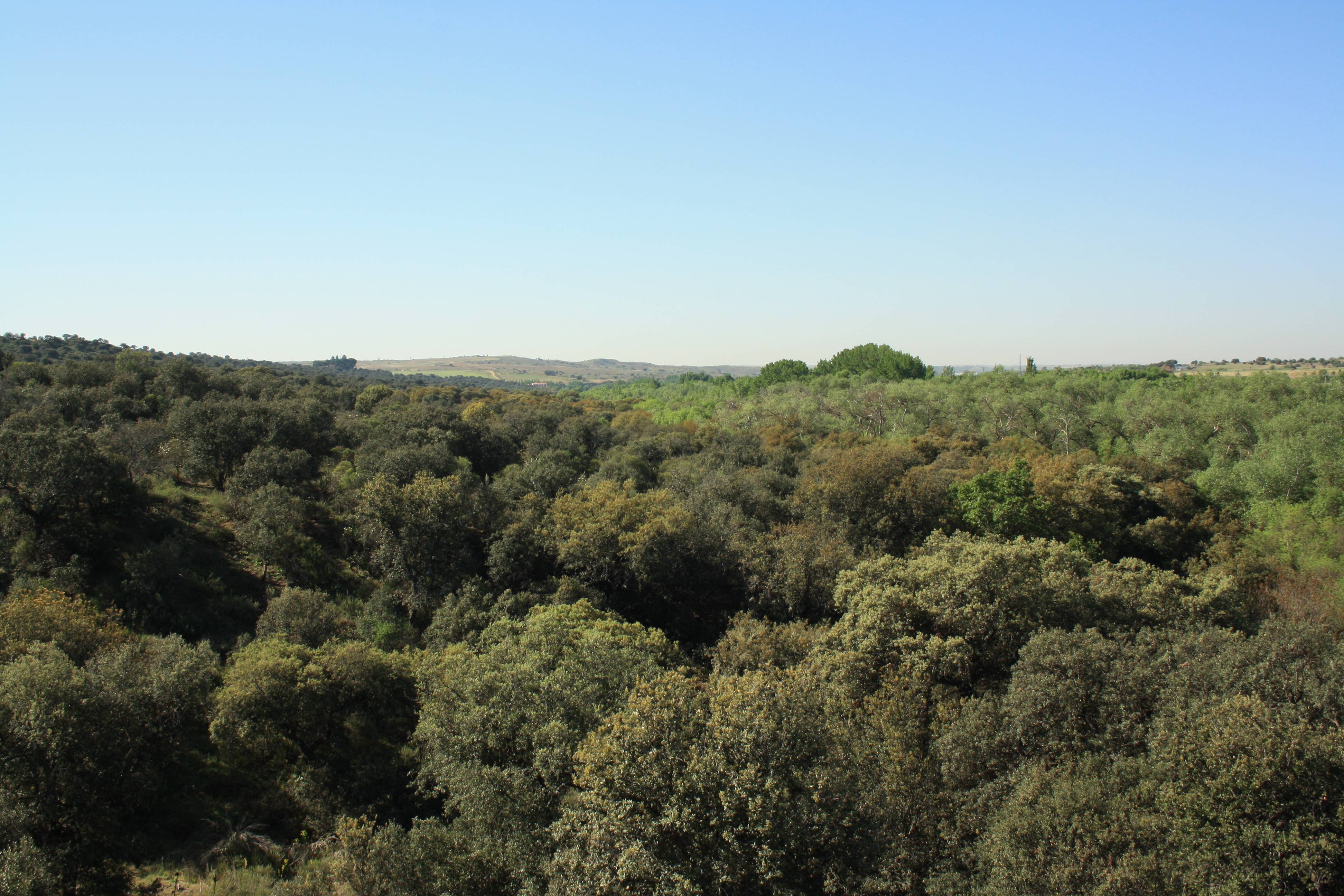 MONTEBATRES Y RIO GUADARRAMA